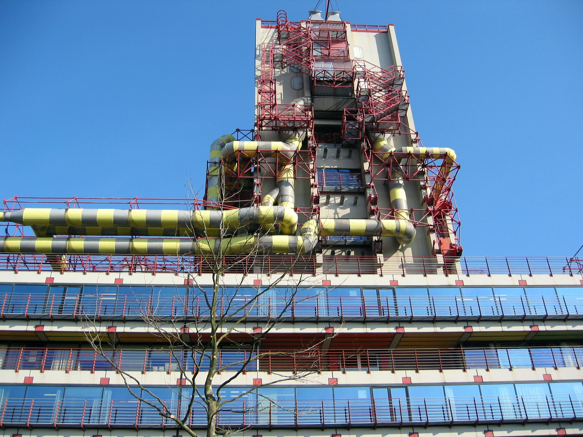 Klinikum Aachen exterior